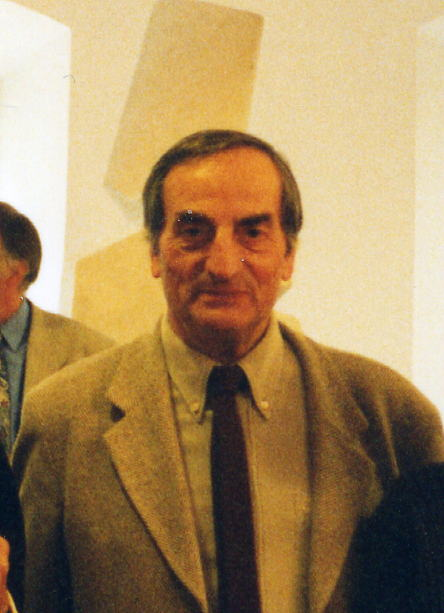 L'écrivain français Charles Juliet après une conférence sur Simone Boisecq à Tübingen (Allemagne) en octobre 1999